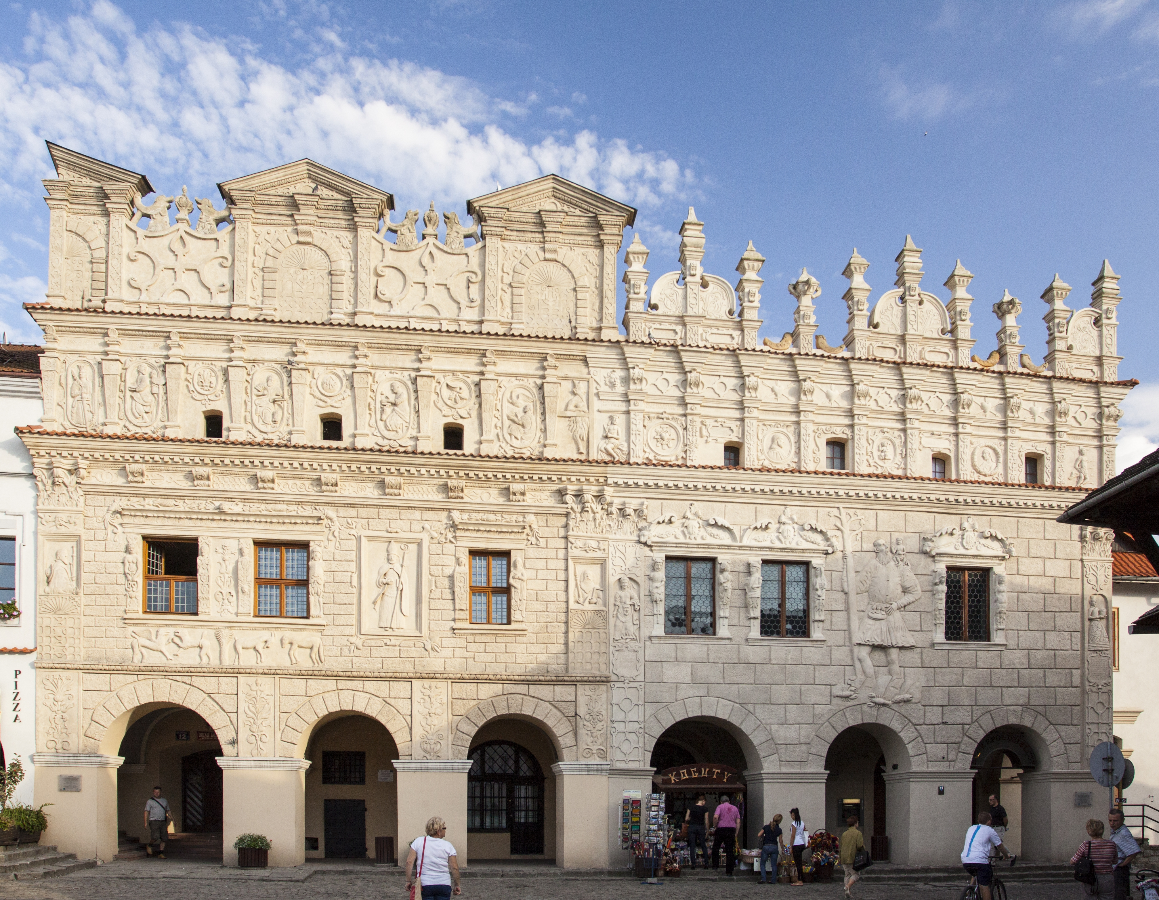 Kamienica Rynek 12, Kazimierz Dolny